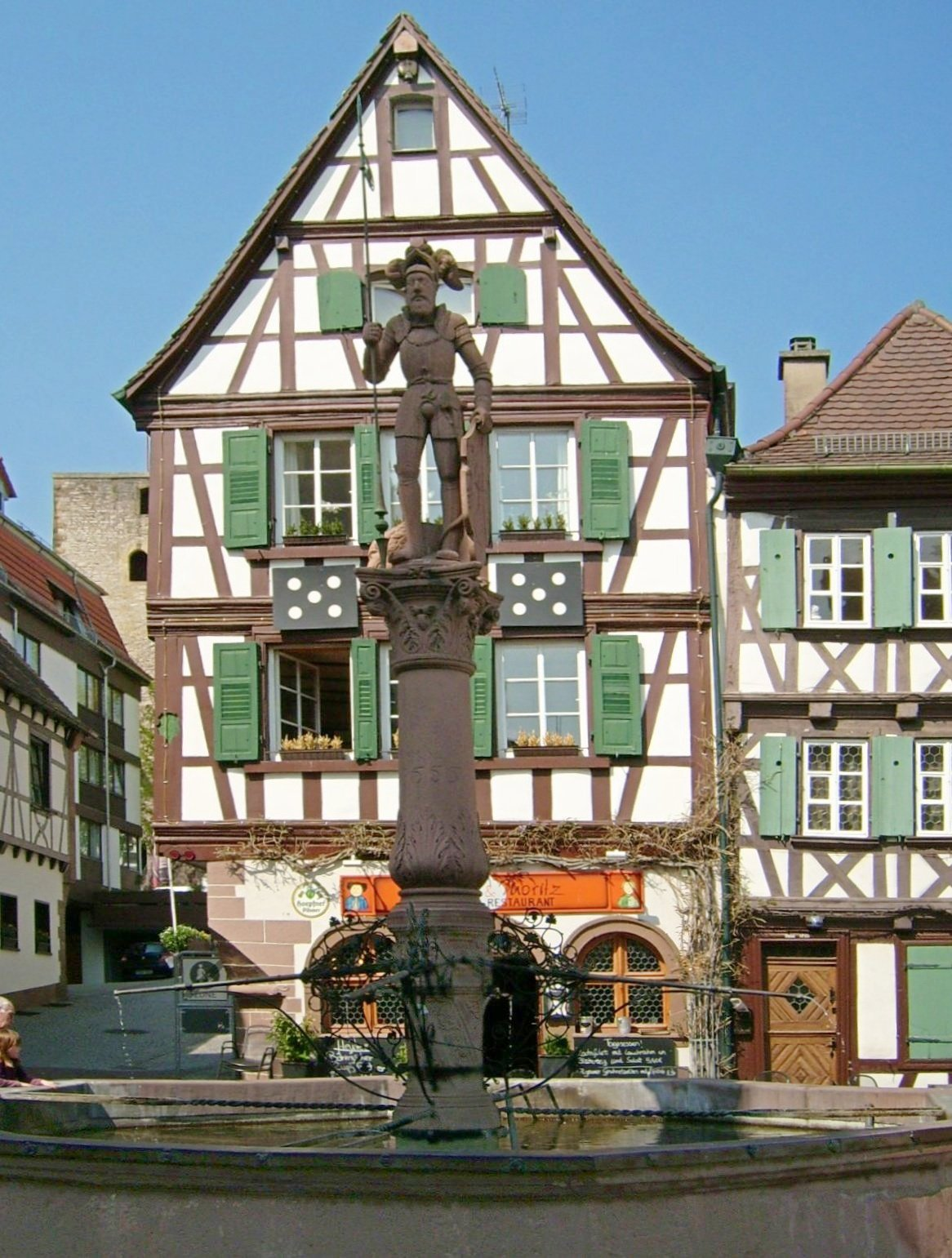 Bildbeschreibung: Bretten Germany Quelle: selbst fotografiert Fotograf: Lokilech Datum: März 2006 22:00, 13. Mär 2006 Kolling 1024 x 768 (34514 Byte) 23:58, 9. Mär 2006 Kolling 640 x 480 (49982 Byte)